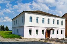 бібліотека, центральна районна бібліотека, Куп'янськ